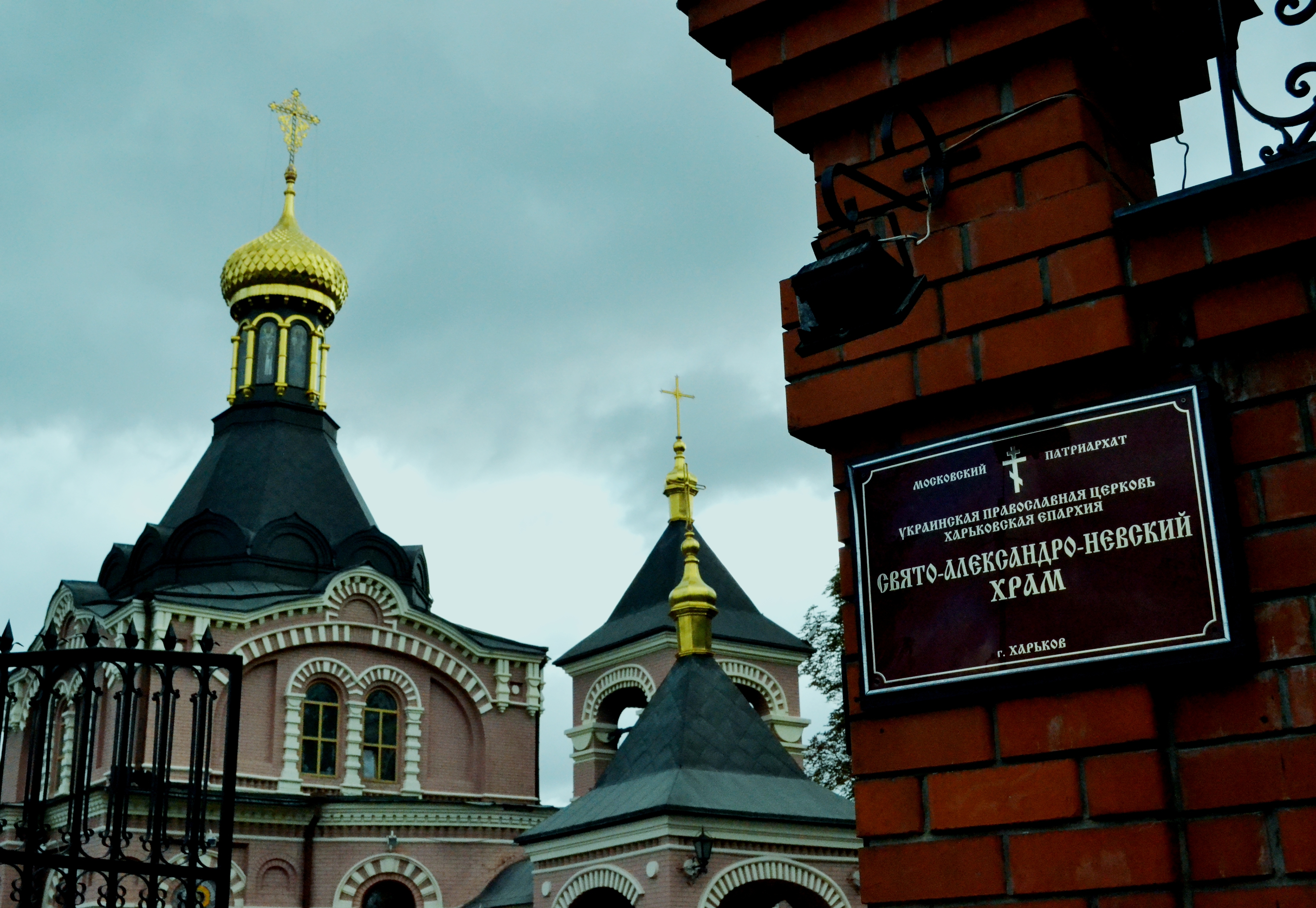 Вид храма со стороны входа